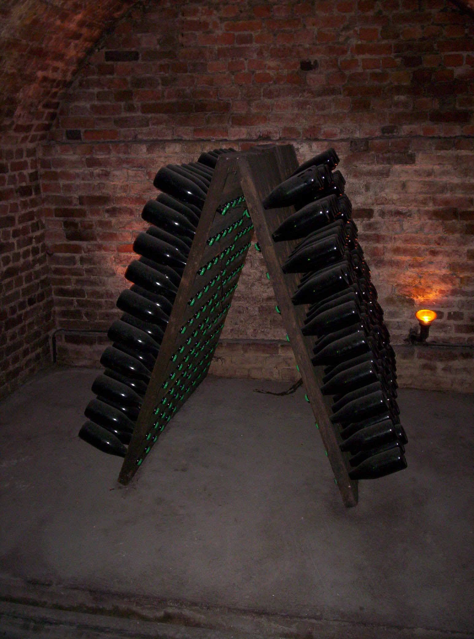 Visite des Caves Mercier à Épernay (Marne, France) : pupitre à dégorgement.